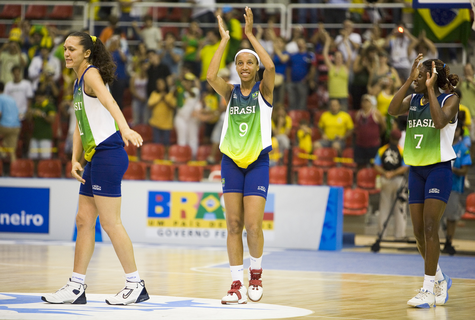 Foto: Divulgação